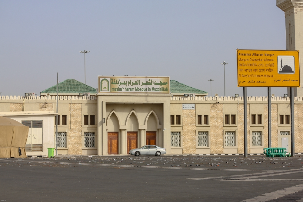 مسجد المشعر الحرام بمشعر مزدلفة بمكة المكرمة